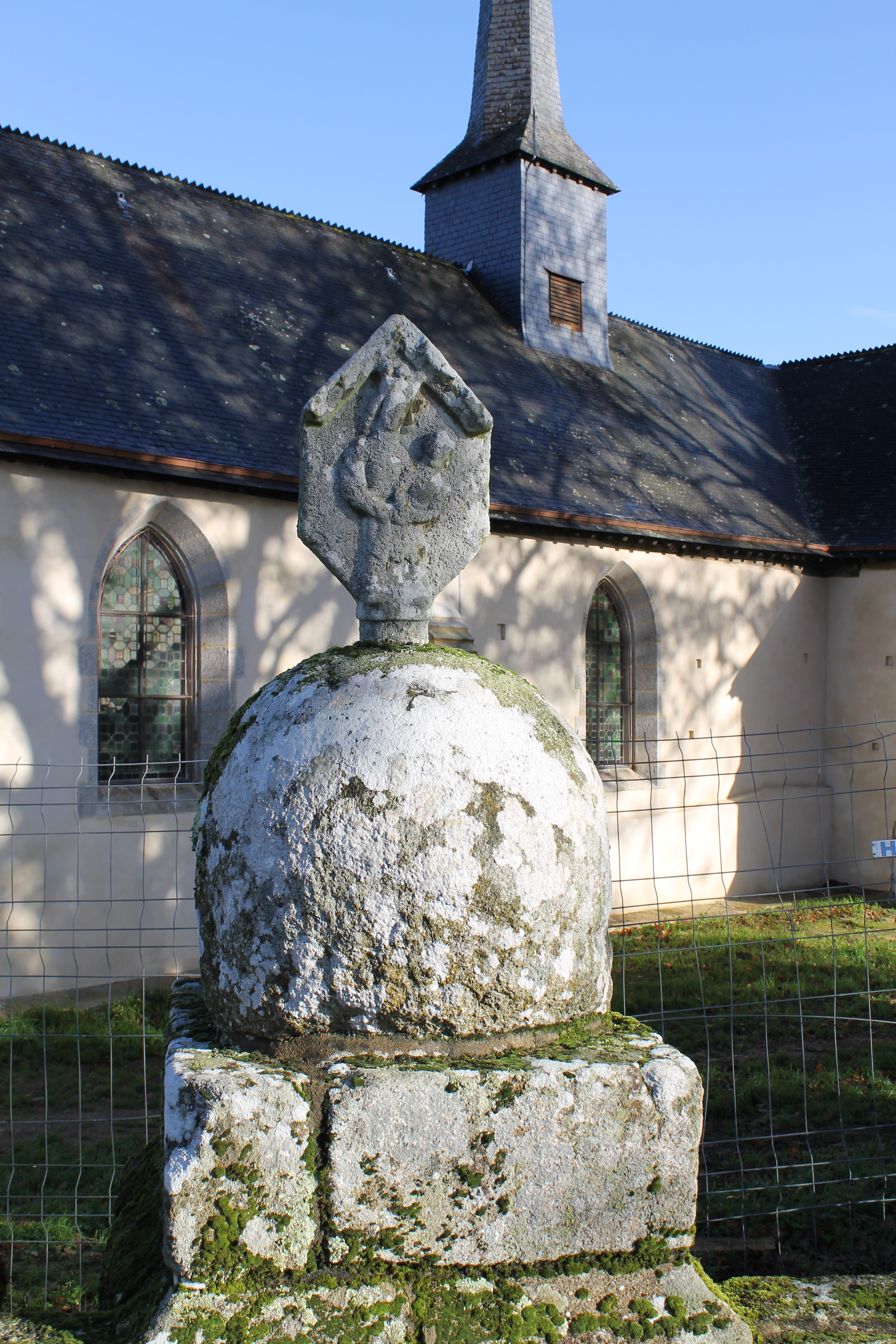 Lec'h de ND du Loc (Saint-Avé)